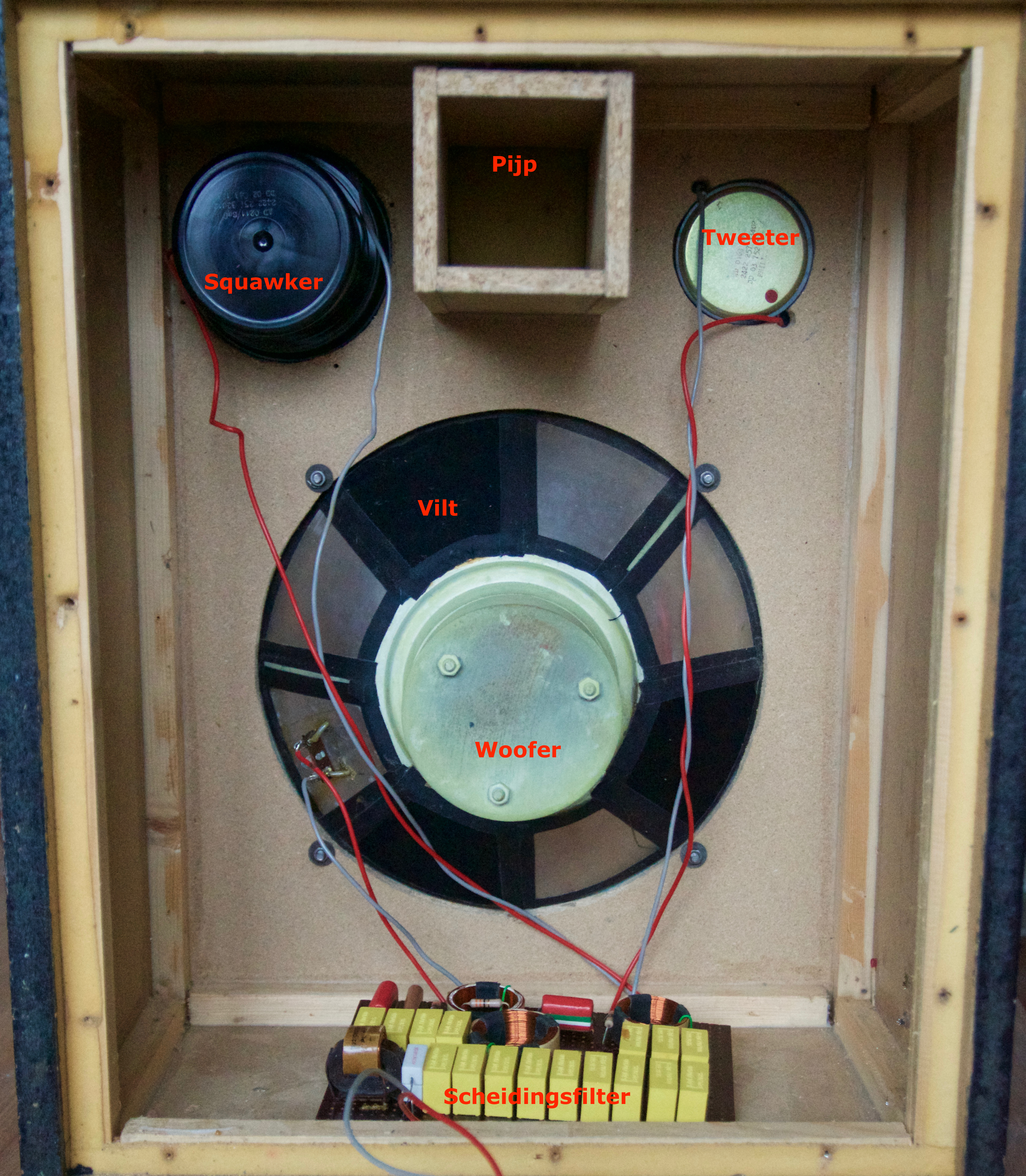 Afbeelding van de achterkant van een gedempt luidspreker systeem